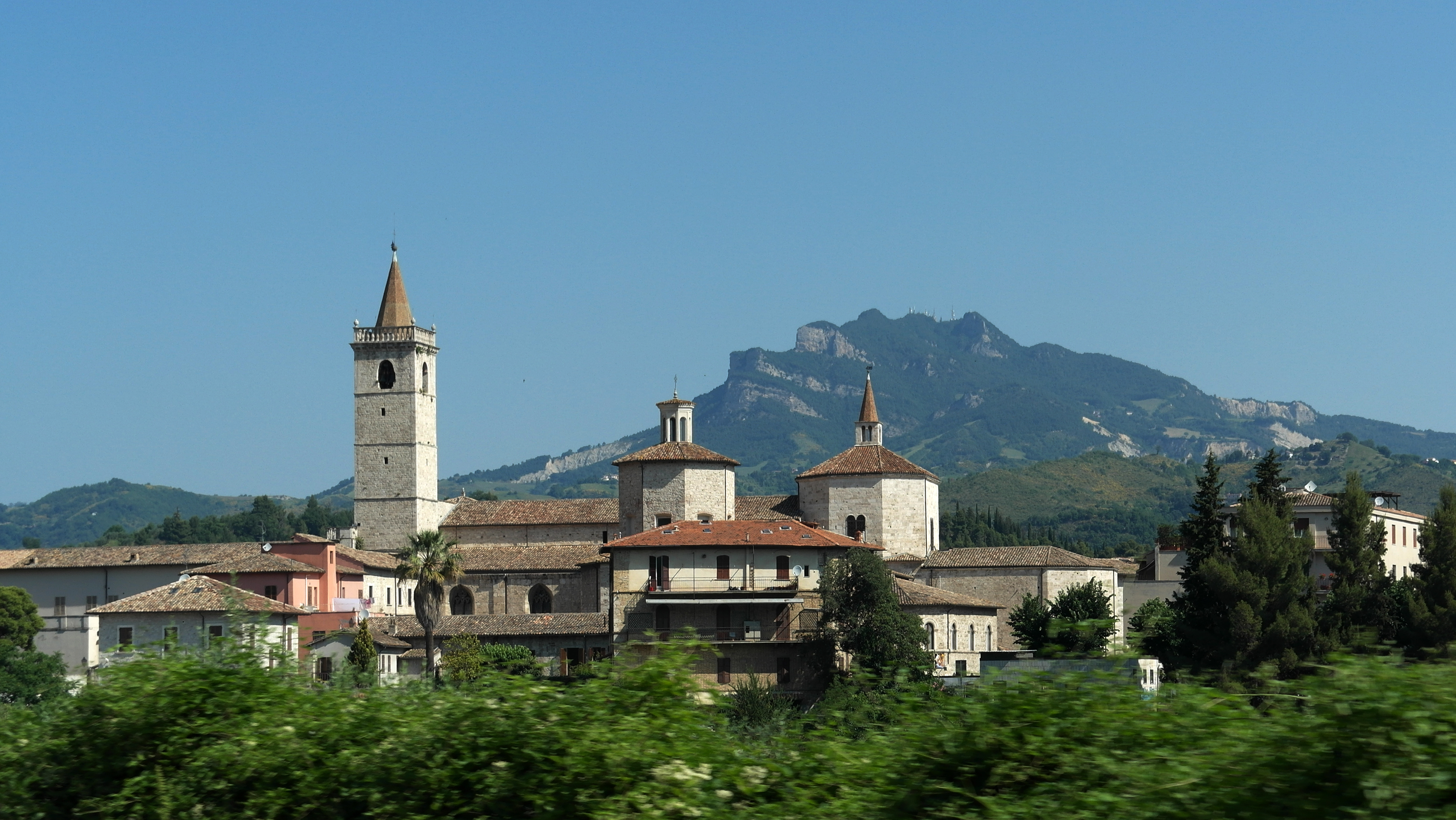 IL Duomo, Ascoli Piceno AP, Marche, Italy